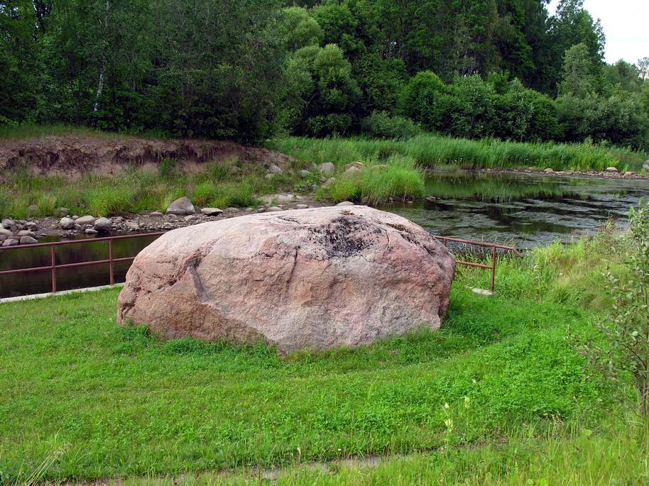 Skleipių akmuo, Mažeikių raj., Viekšnių seniūnija, Skleipiai Foto: Algirdas, 2006 m. liepos 18 d., Lietuva